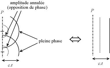 Équivalence entre le front plan et la réémission sphérique ; le trait plein figure le maximum de l'onde, le trait pointillé le minimum (les deux sont distants d'une demi-longueur d'onde). Auteur : Christophe Dang Ngoc Chan, réalisé avec un programme de dessin vectoriel Licence GFDL Christophe Dang Ngoc Chan